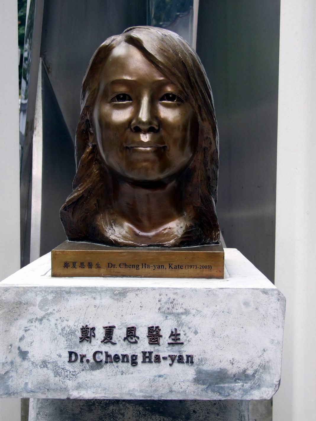 中文（香港）: 位於香港公園抗疫英雄紀念碑的鄭夏恩醫生銅像